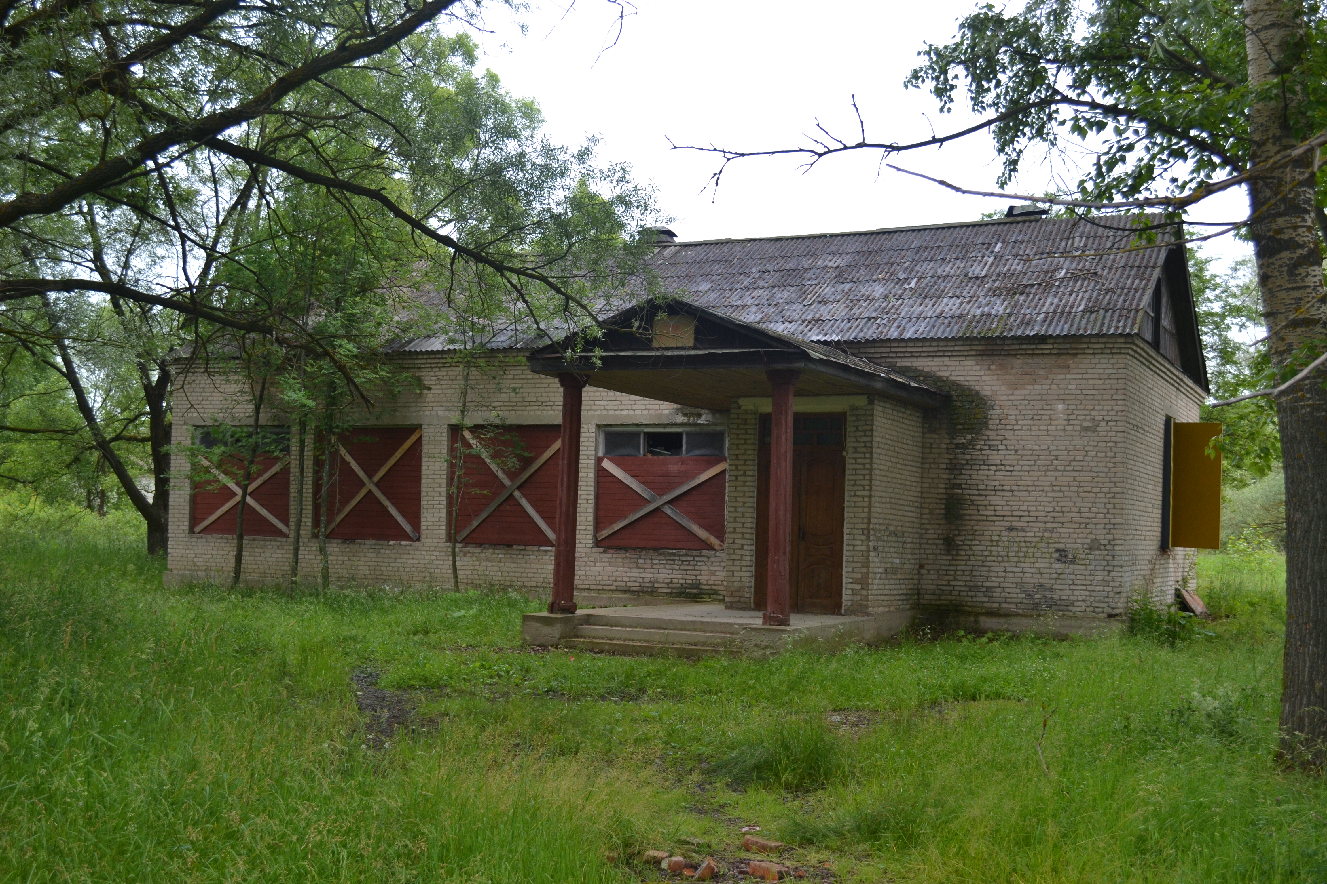 ДК в Маврино (Шатурский район)